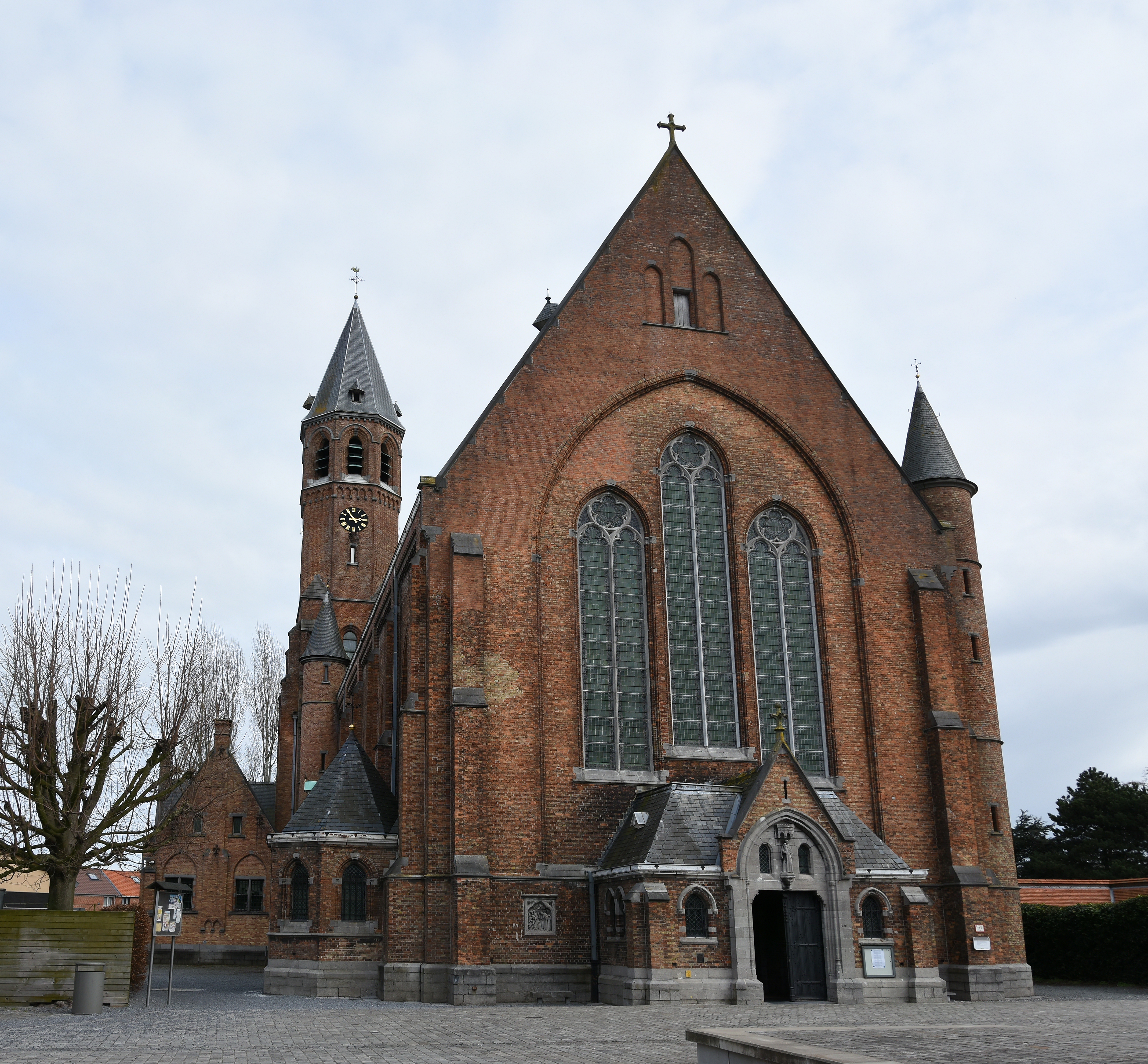 De Sint-Antoniuskerk te Balgerhoeke, België